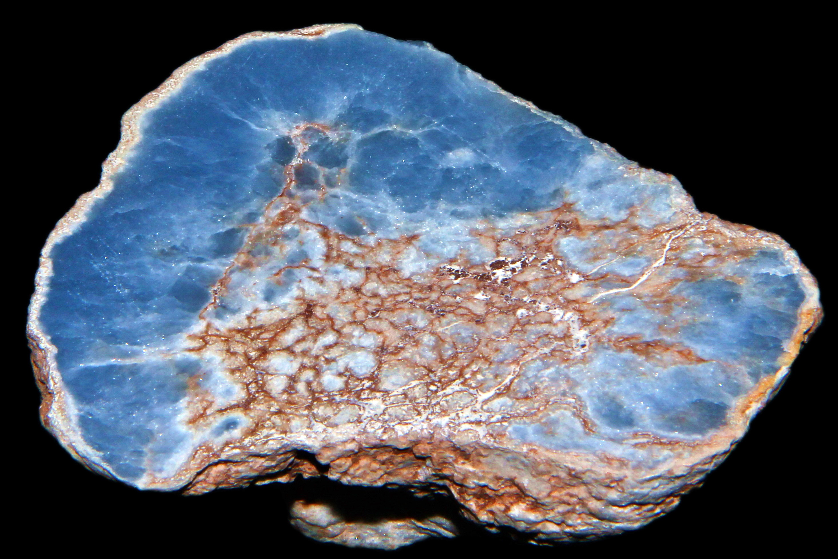 Angelit, anhydryt, celestyt - Lima, Peru.